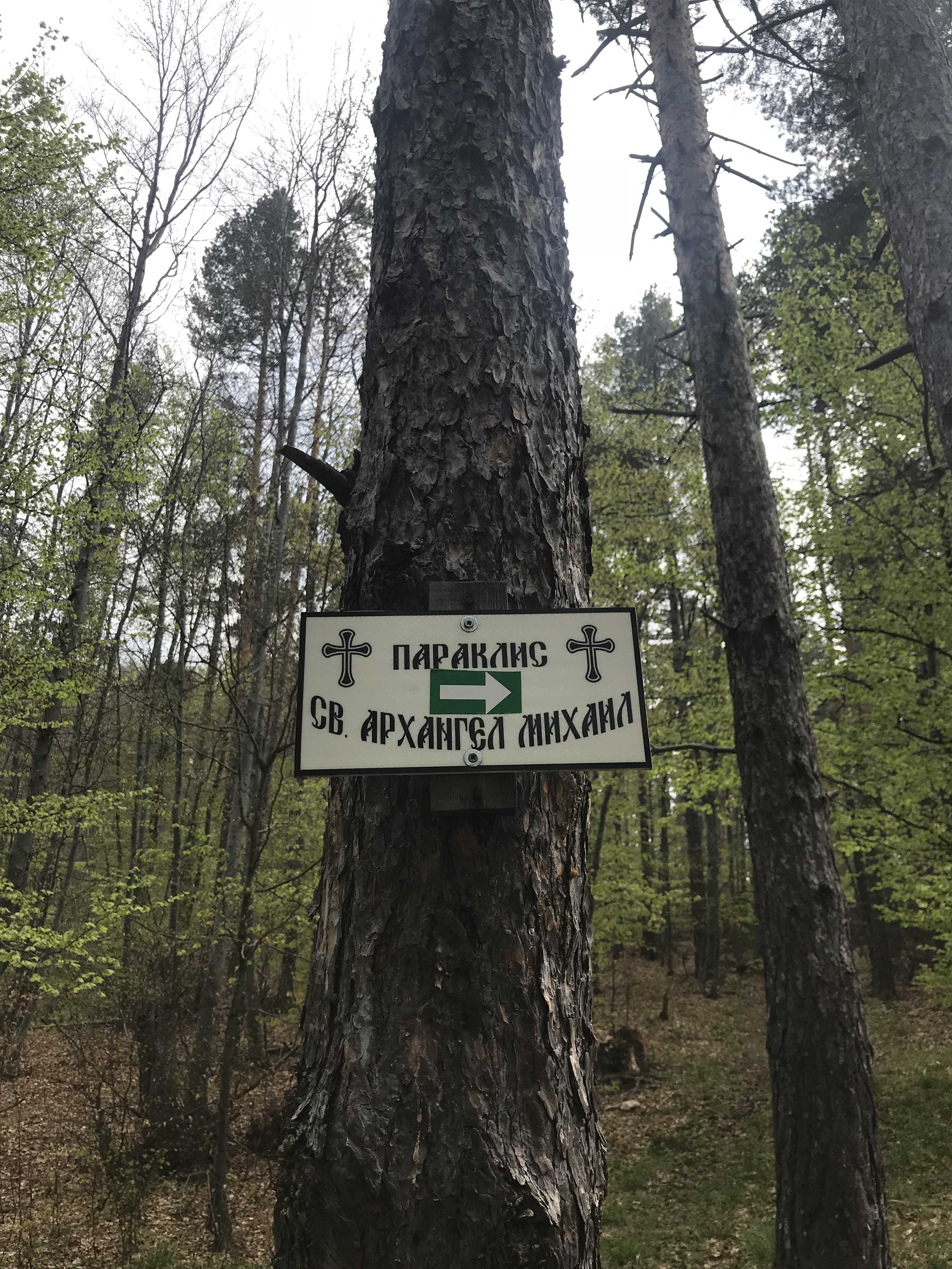 Указателни табели към параклиса